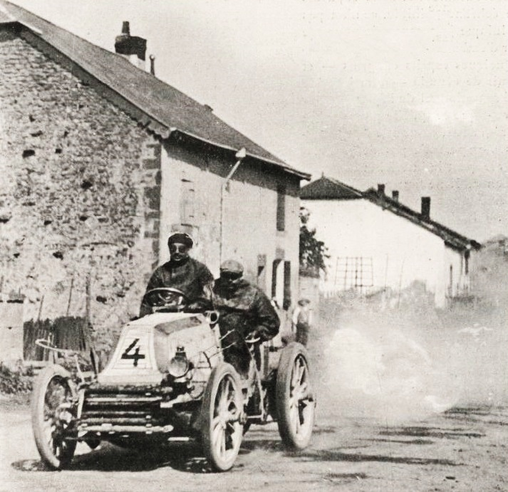 Henri Fournier à Sachy, 10 kilomètres avant la frontière (Paris-Berlin 1901) - Le Sport universel illustré du 6 juillet 1901, p.434